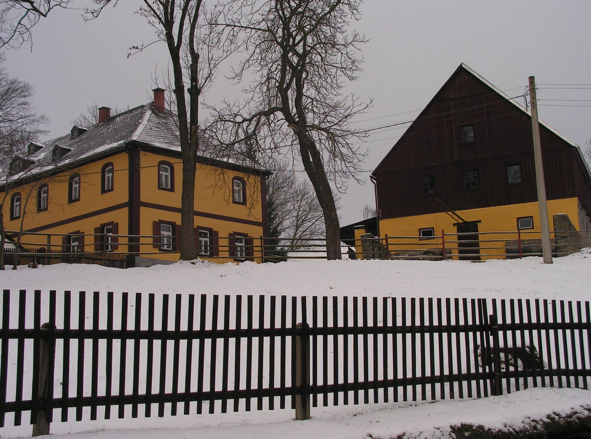 Pöckelgut